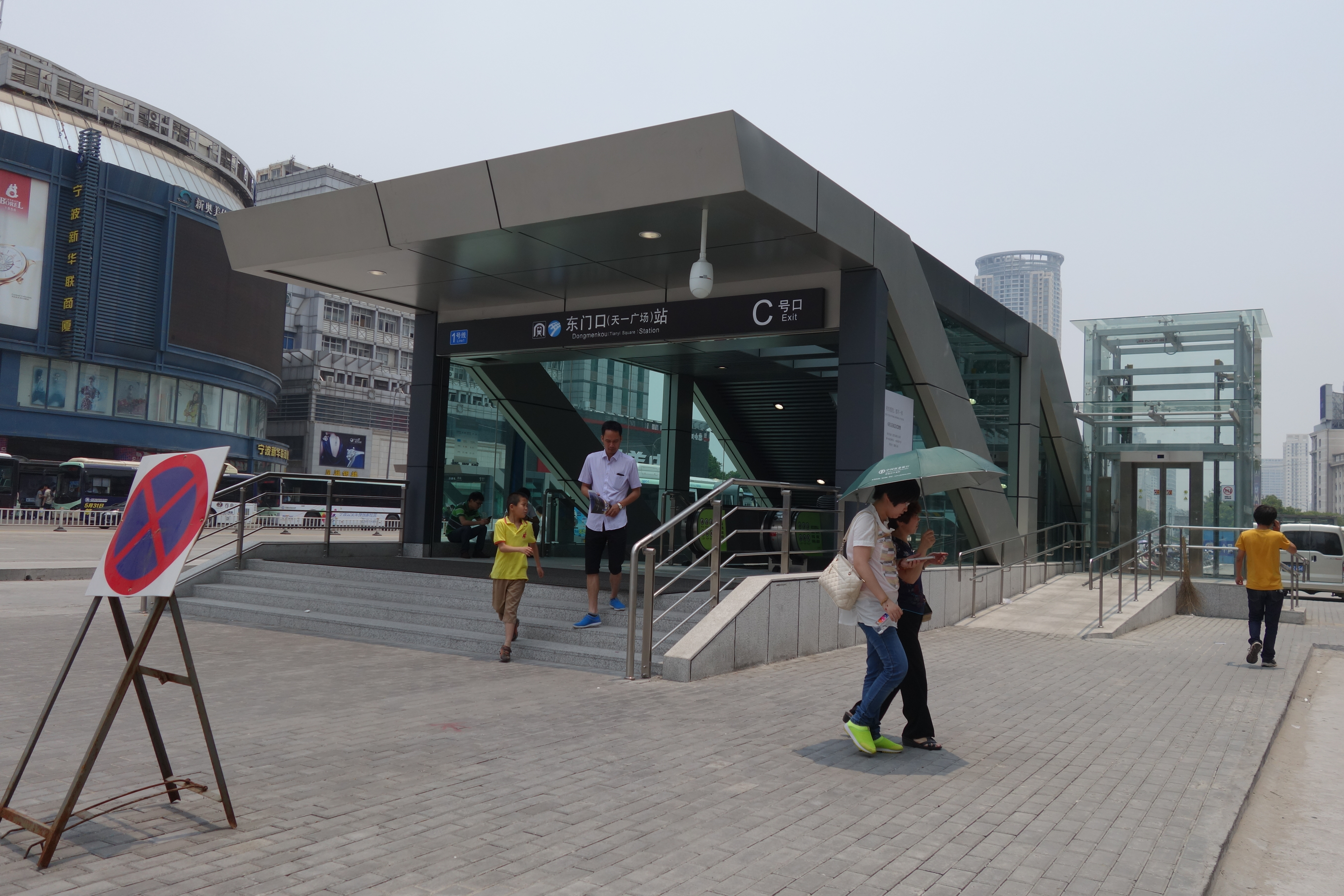 东门口站C口